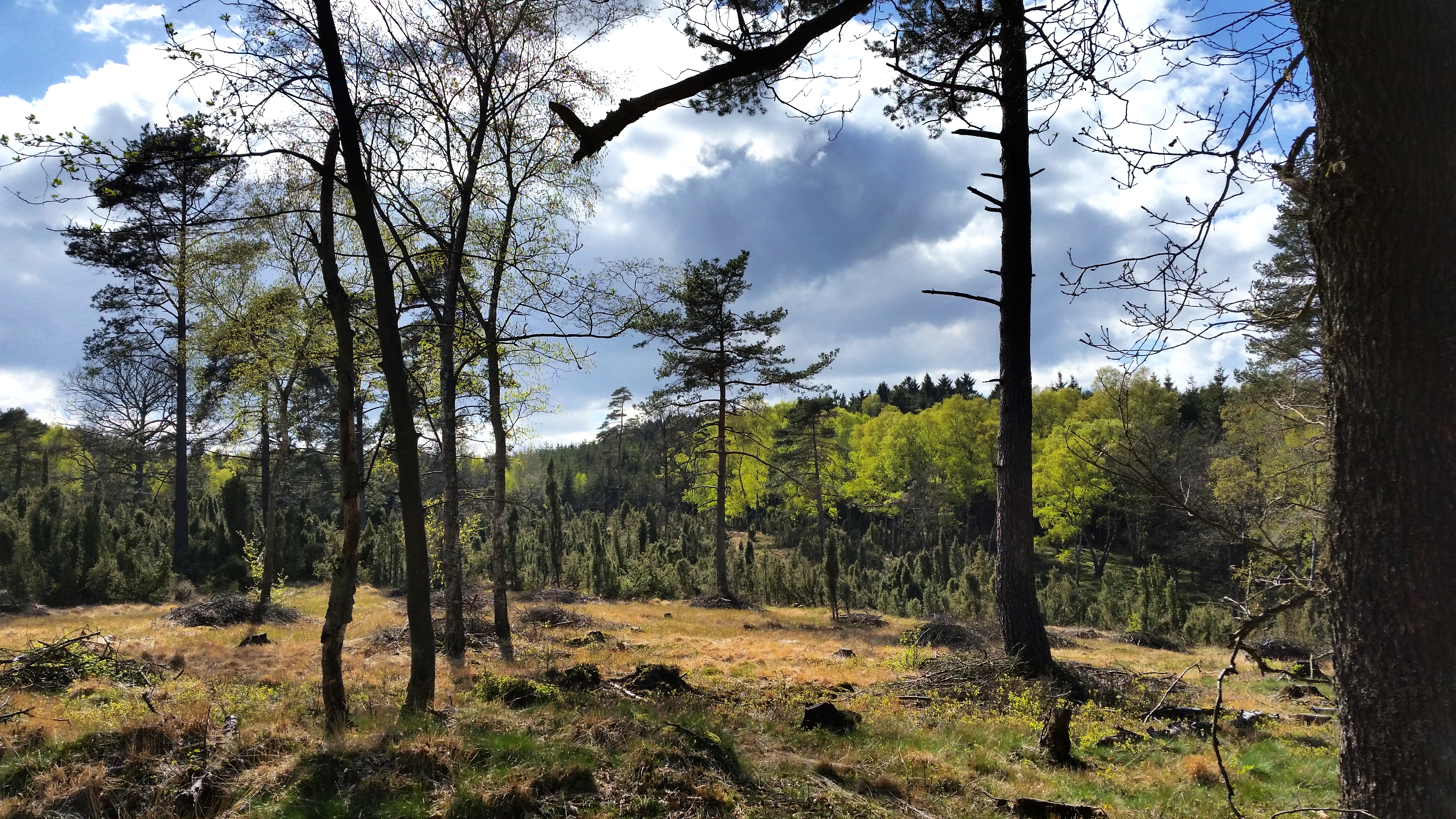 Naturschutzgebiet „Krähenpfuhl“ (NSG OE-005) im Kreis Olpe, Nordrhein-Westfalen: „Das versunkene Schloss“ bei Kirchhundem im Sauerland. Eine Legende rankt sich um diesen Ort. Das Bild entstand beim Osterspaziergang.